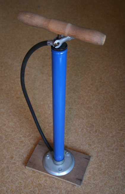 Fietspomp.